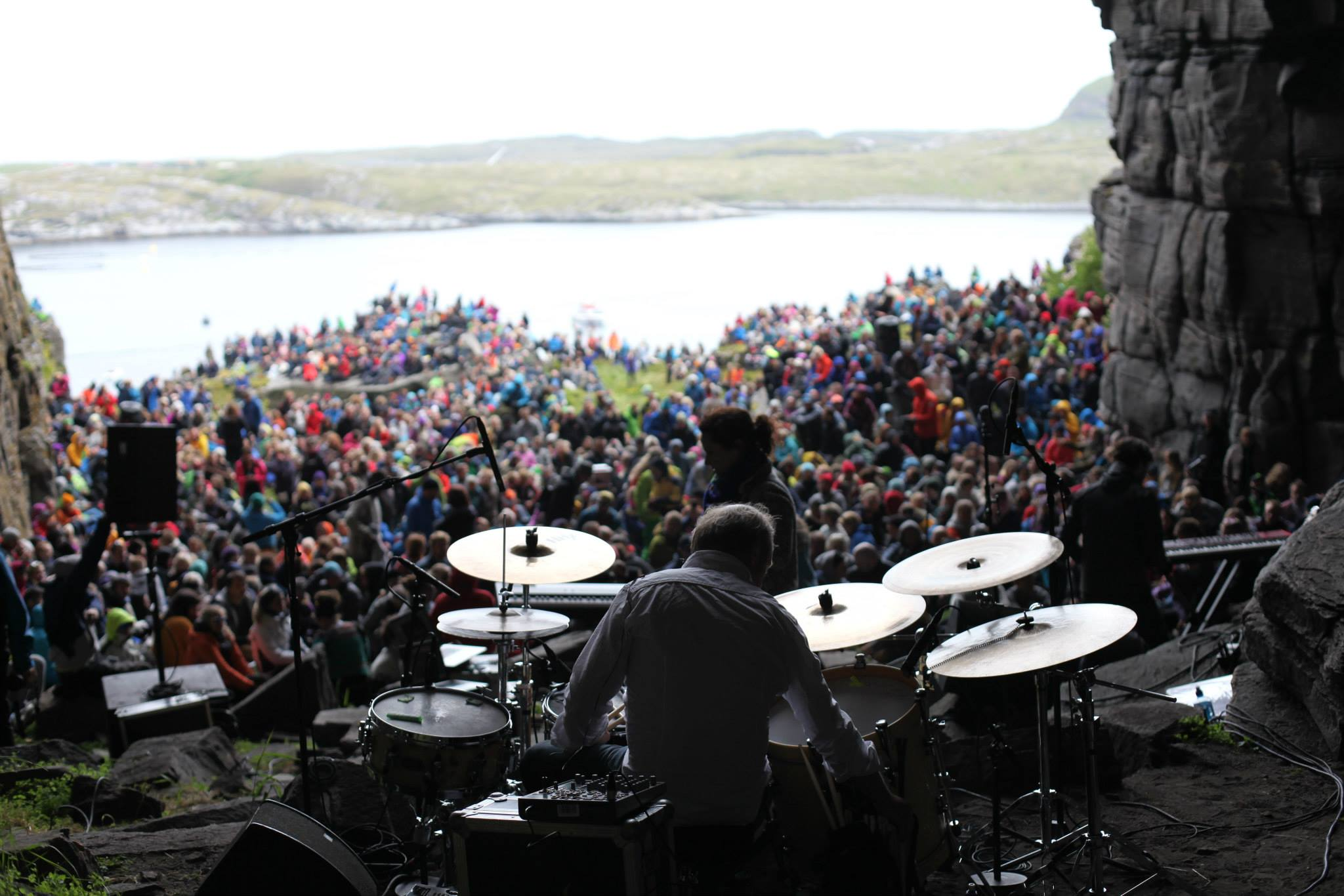 Anneli Drecker i Kirkehelleren, foto: Endre Lohne